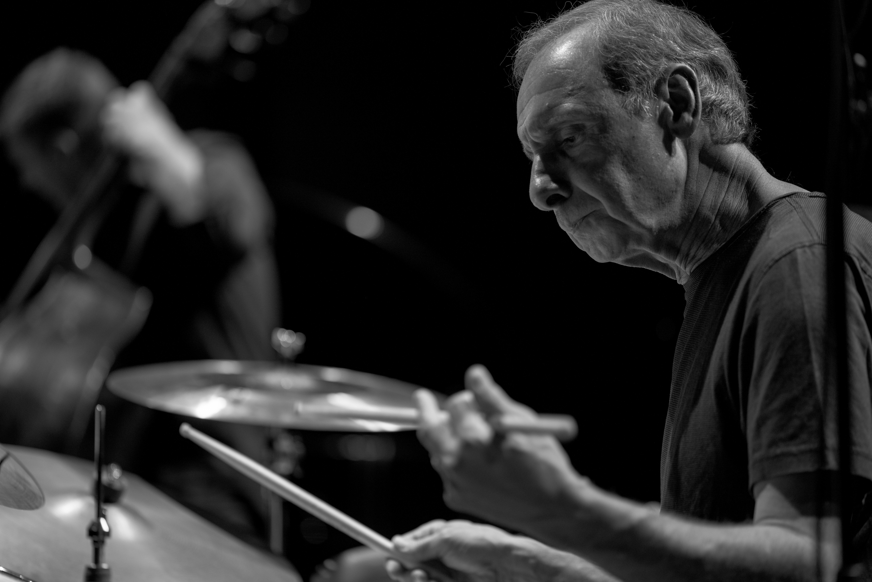 Joe LaBarbera 19º FESTIVAL INTERNACIONAL DE JAZZ DE PUNTA DEL ESTE FINCA EL SOSIEGO, Maldonado, Uruguay